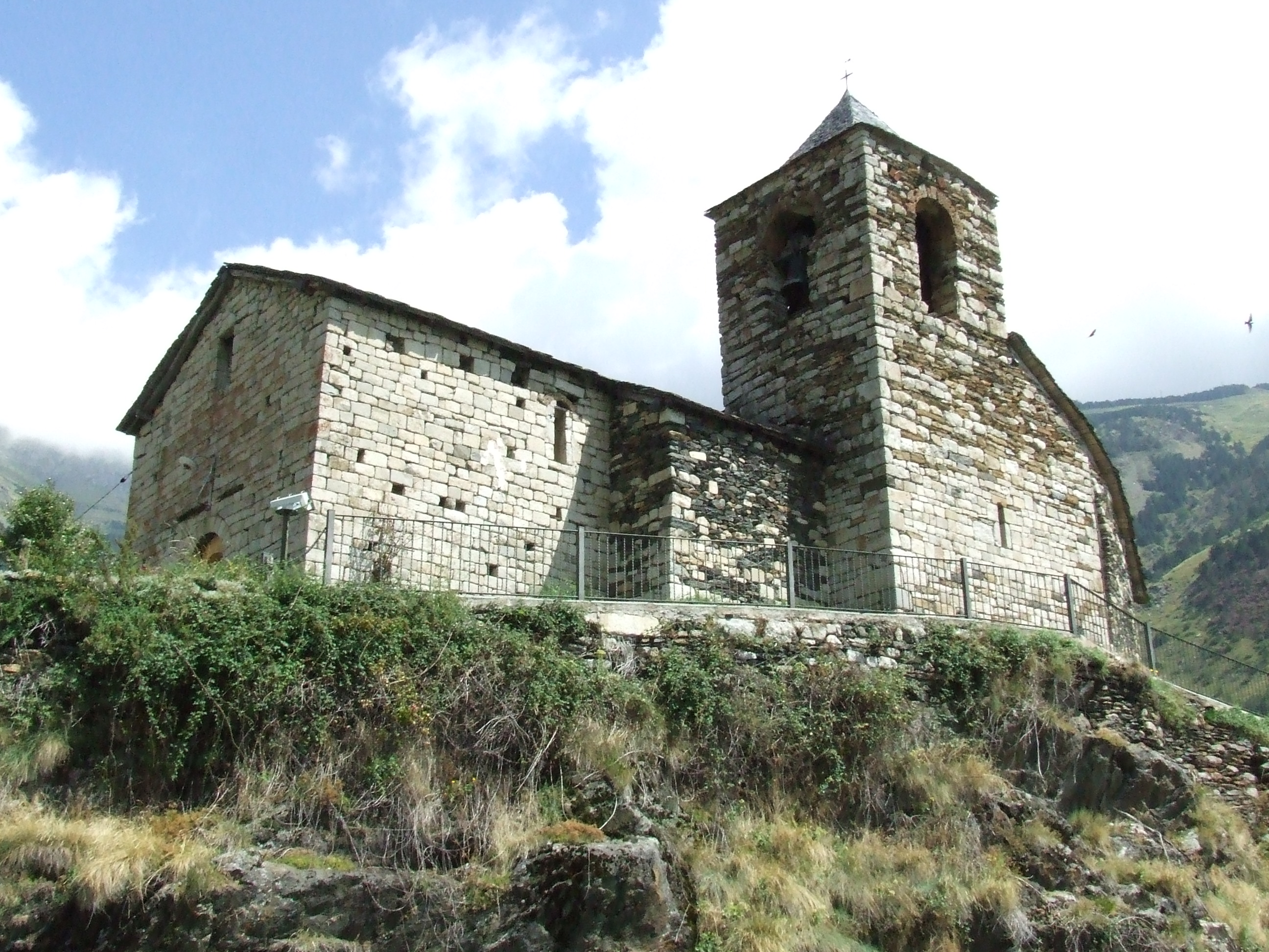 Façana meridional de Sant Vicenç´de Cabdella (Cabdella, la Torre de Cabdella, Pallars Jussà)